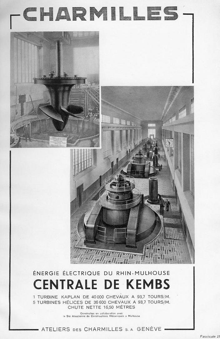 Blick in den Maschinensaal des Kraftwerks Kembs mit einer Kaplan-Turbine und fünf Propeller-Turbinen. Werbung der Ateliers des Charmilles aus Genf